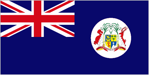 blue ensign of mauritius 1906-1923